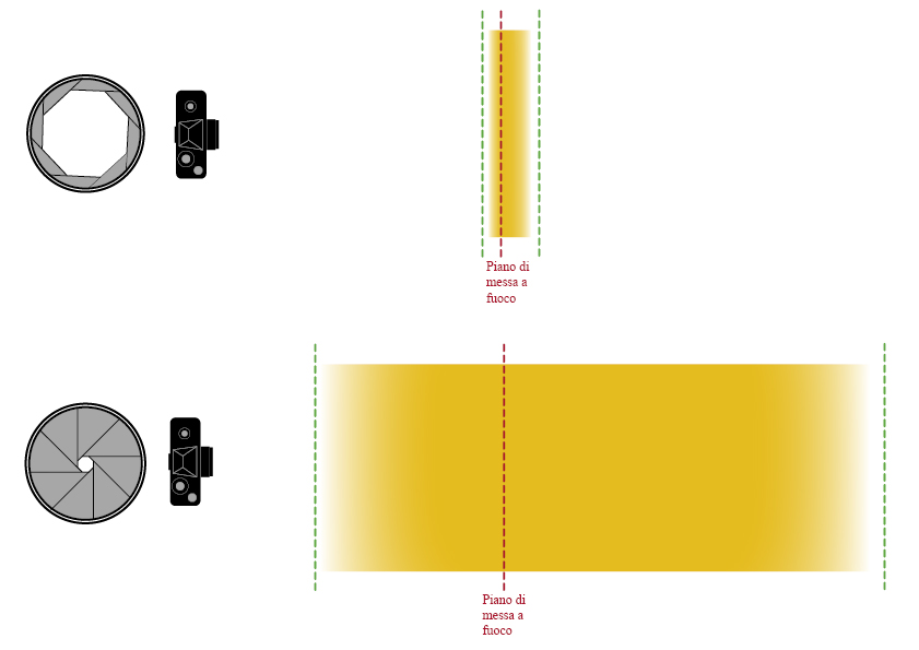 Variare la profondità di campo usando il diaframma